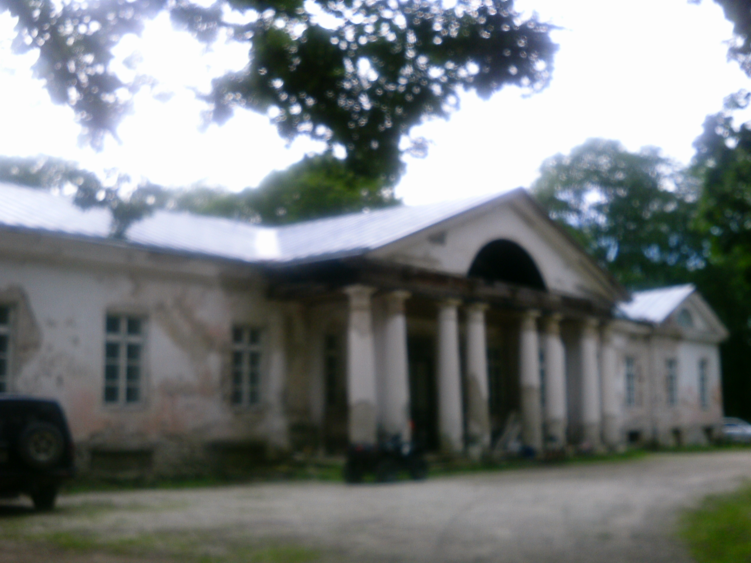 Massu mõisa peahoone.